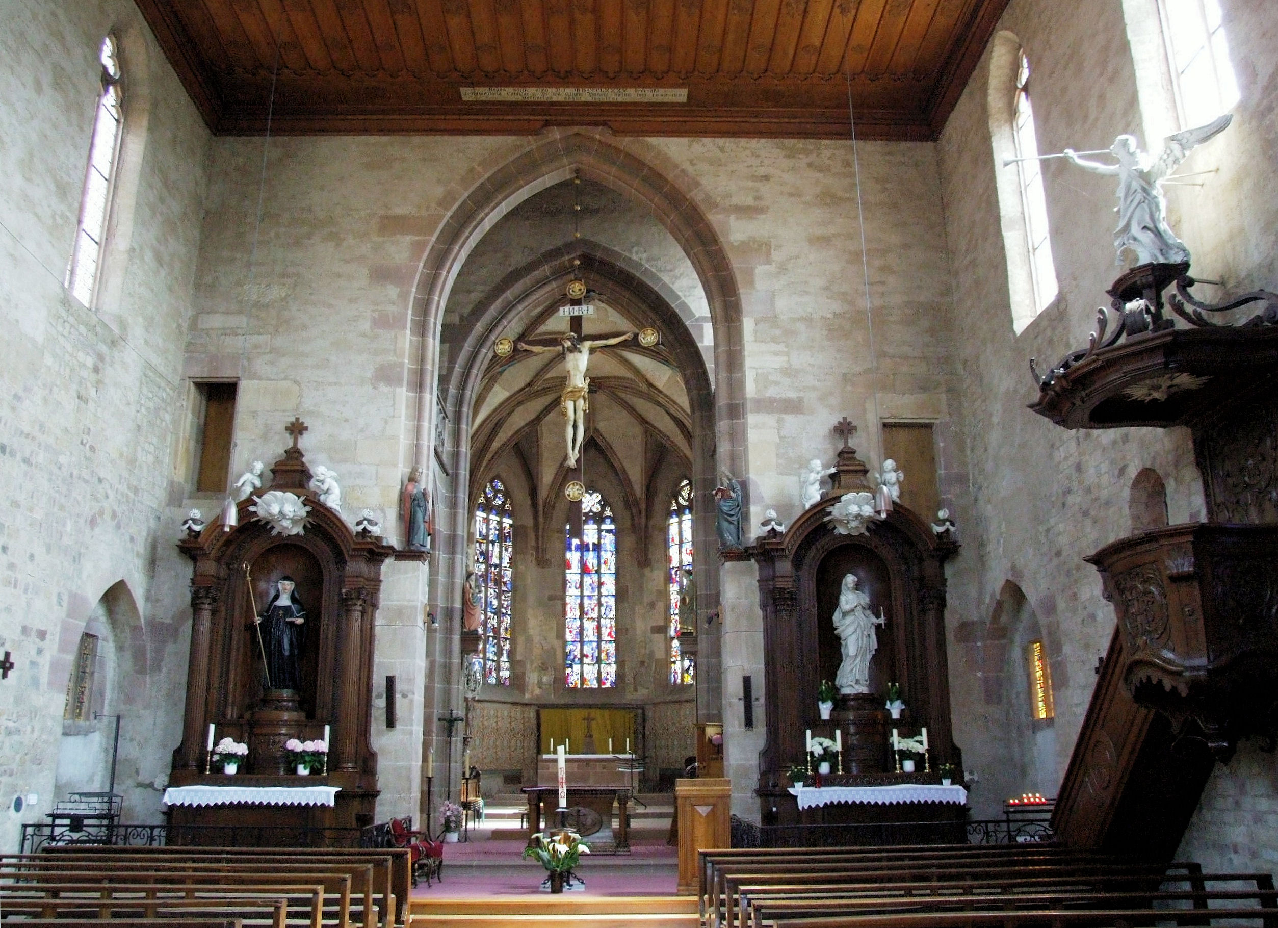 Walbourg - Eglise Sainte-Walburge - Nef